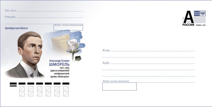 Конверт почты России 2001 «Шморель Александр»